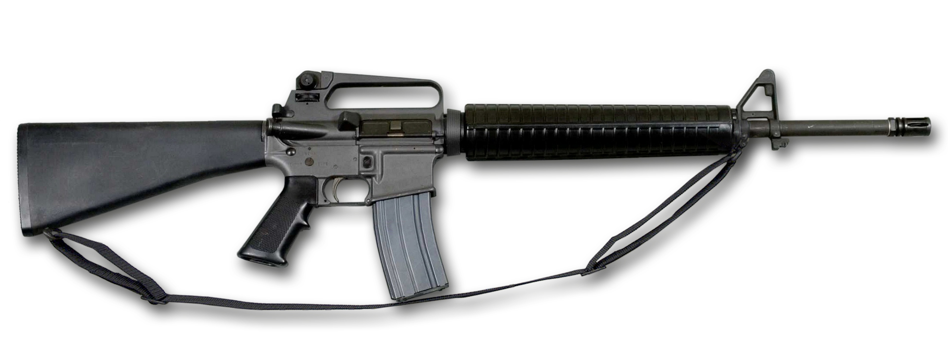 Illustration des amerikanischen Assault Rifle (Sturmgewehr) M16A2. Neutraler (weißer) Hintergrund mit "technischen Schatten" und Einmontage eines Gewehrgurtes.